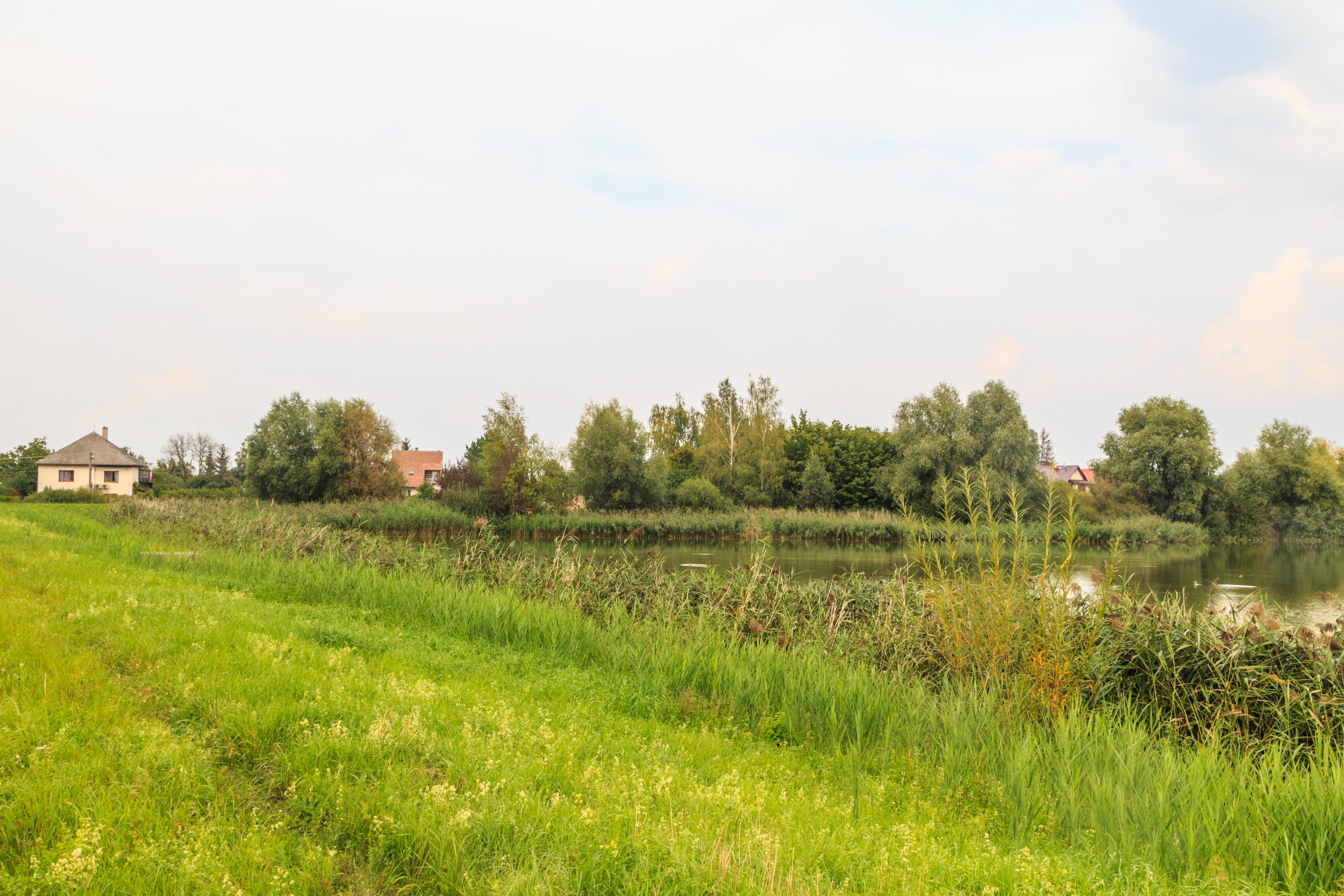 Rybník Rohlíčky u Librantic